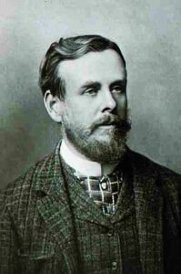 Portrait du baron Ferdinand von Richthofen jeune, célèbre par ses travaux de géomorphologie